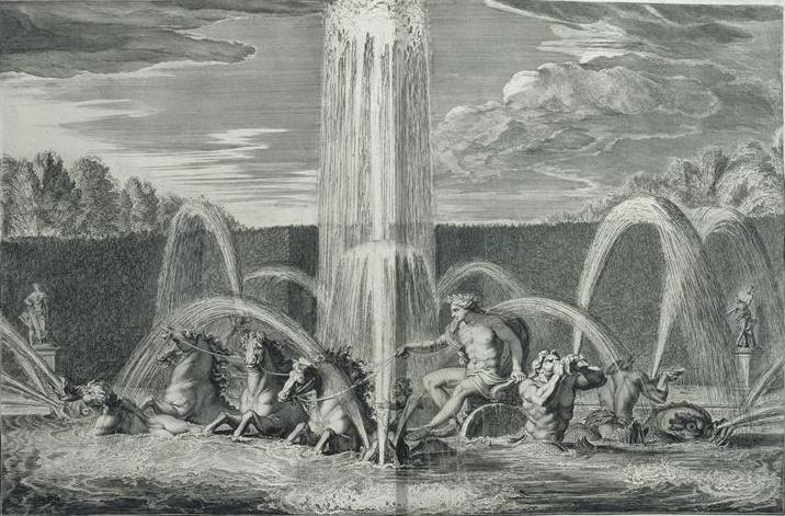 Vue du Char d'Apollon dans le bassin d'Apollon